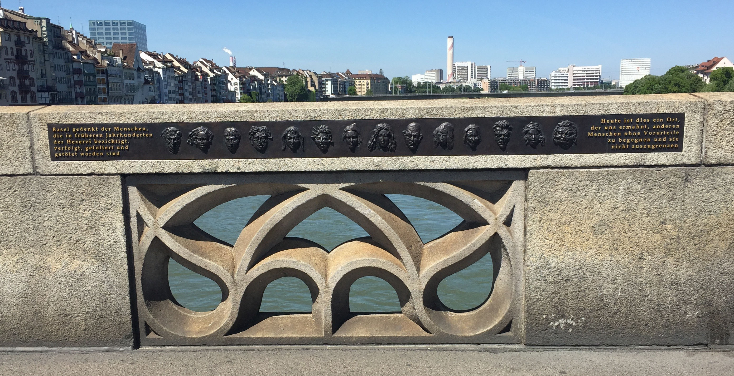 Mittlere Rheinbrücke in Basel, Gedenktafel für die Opfer der Hexenverfolgung von Markus Böhmer